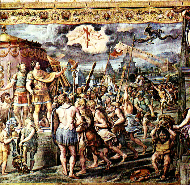 In hoc signo vinces, Raphael, Sala di Costantino, Vatican City